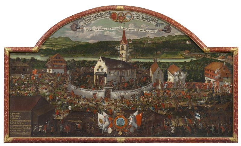 Darstellung des Gefechts bei Sins am 20. Juli 1712